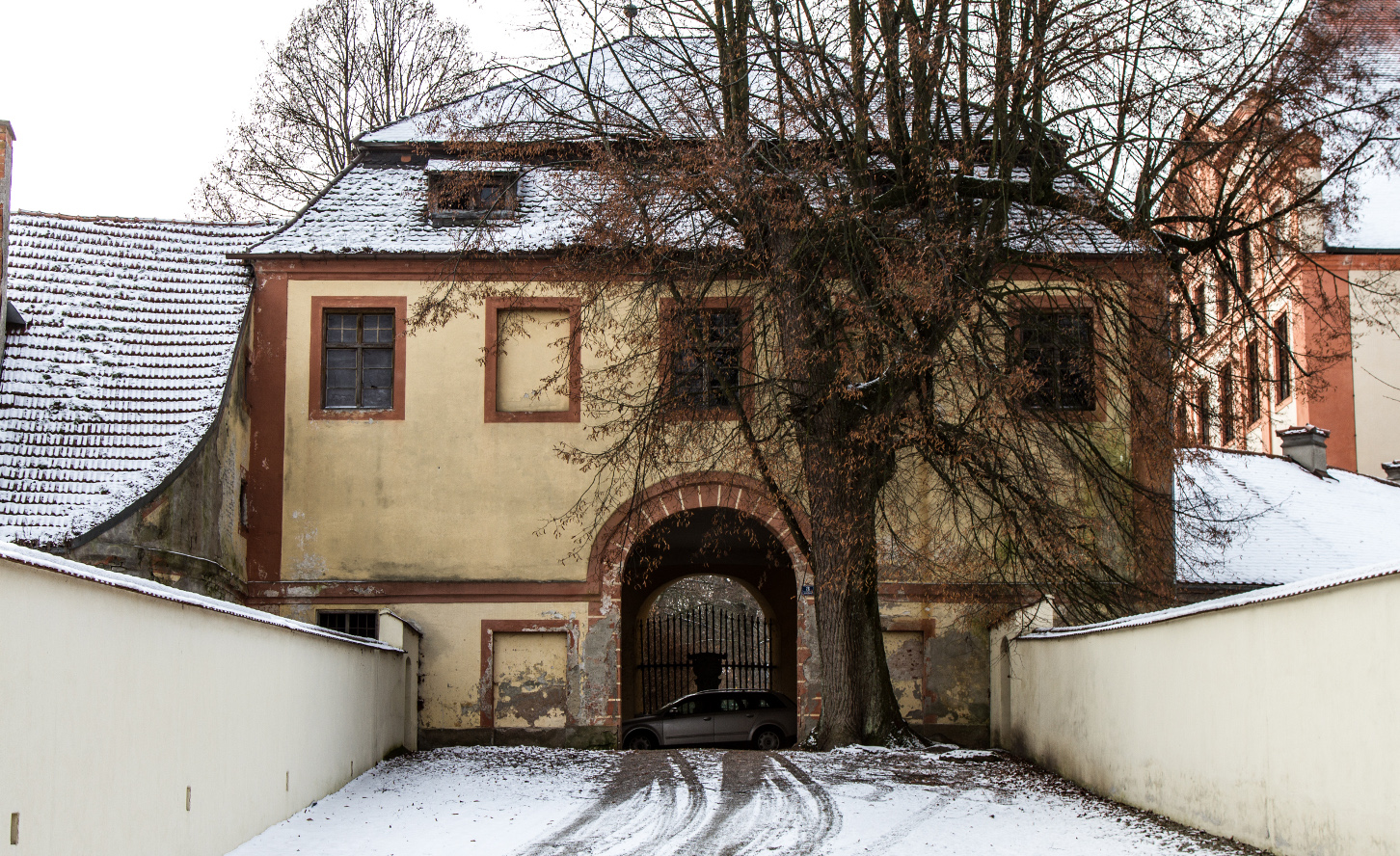 Schloss Rohrbach (ilm); Torhaus mit Mansardwalmdach, Mitte 18. Jh. This is a photograph of an architectural monument.